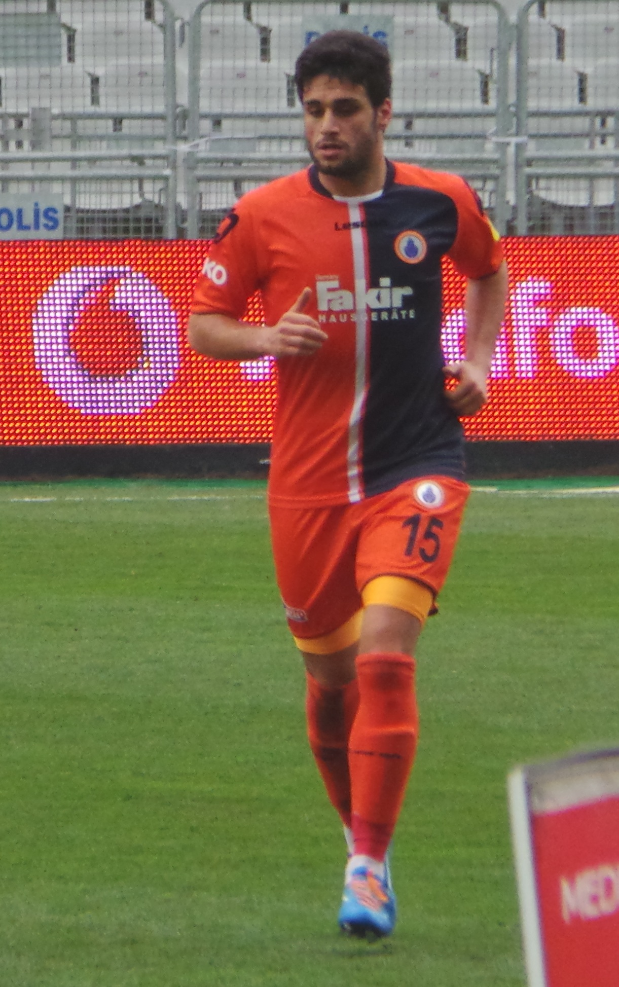 Murat Taşdelen